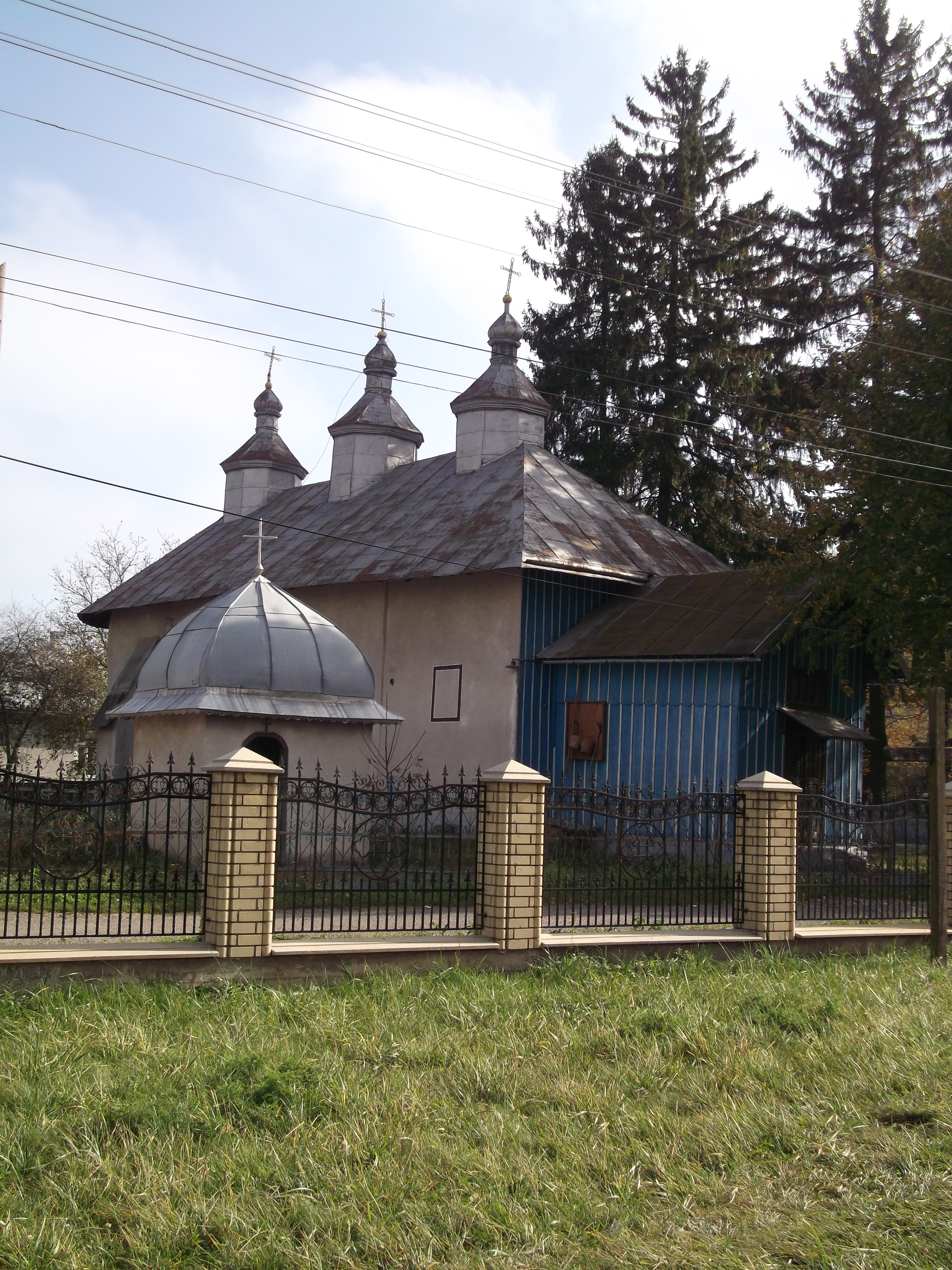 Вознесенська церква (мур.), смт.Лужани